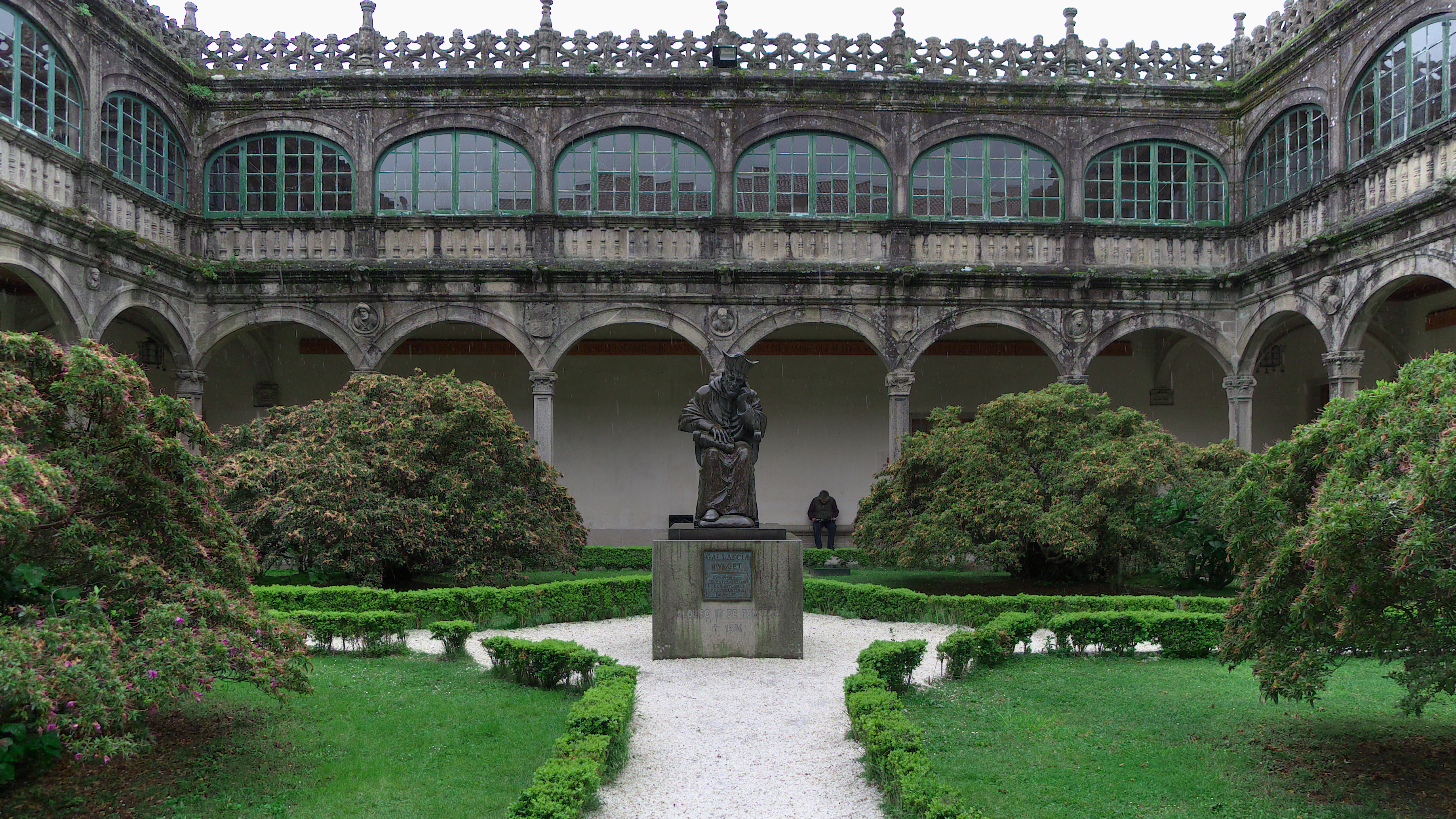 También llamado "de Fonseca", por ser Alonso de Fonseca y Ulloa (Alonso III de Fonseca), arzobispo de Santiago de Compostela, su fundador. Introduce en la capital las nuevas formas renacentistas, como este patio, obra de Rodrigo Gil de Hontañón (1500-1577)